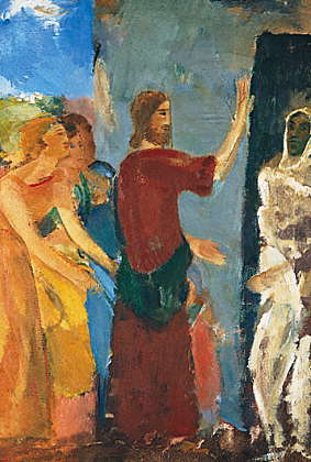 Jesus uppväcker LazarusJesus resurrects LazarusDutch: Jesus wekt Lazarus op